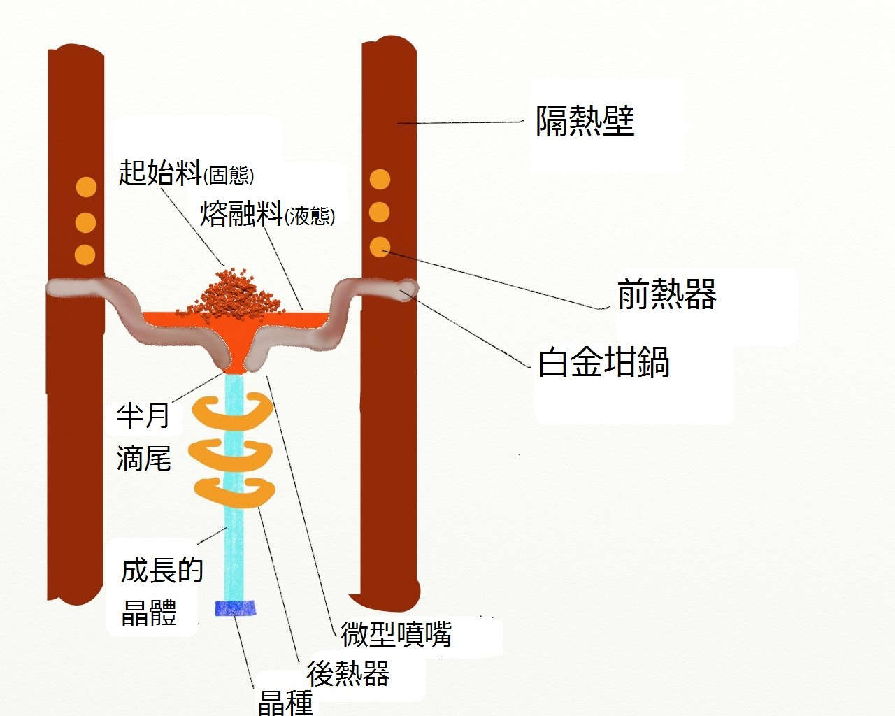 μ-PD Schematic